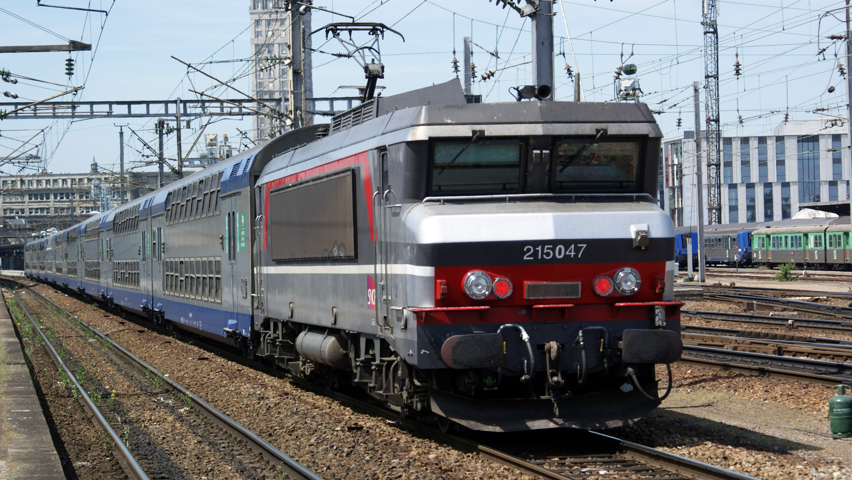 La BB 15047 et son TER2N entre en gare d'Amiens